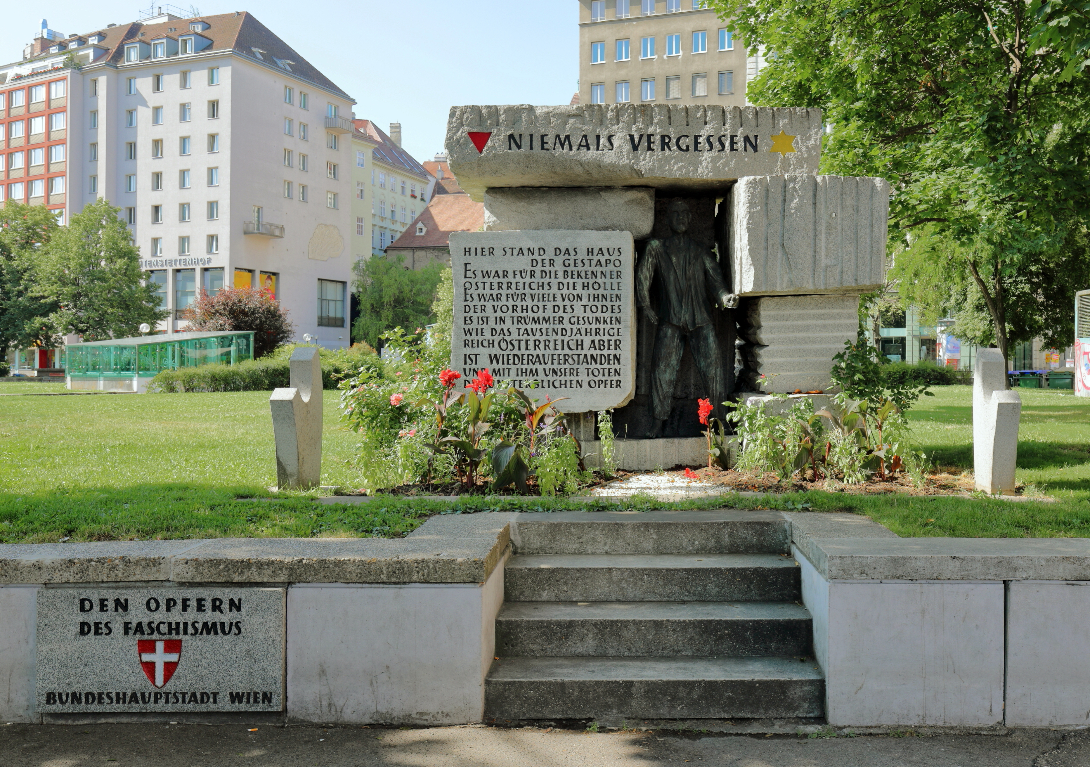 Das Mahnmal „Niemals Vergessen für die Opfer der Gestapo“ am Morzinplatz im 1. Wiener Gemeindebezirk Innere Stadt. Es erinnert an die Zentrale der Gestapo im ehemaligen Hotel Métropole. Das von der Stadt Wien gestiftete Mahnmal wurde vom technischen Leiter der Städtischen Steinmetzwerkstätte der Stadt Wien Leopold Grausam entworfen und am 1. November 1985 enthüllt. Es ersetzte den am 11. April 1951 rund 50 Meter südlicher aufgestellten Gedenkstein für die Opfer des Faschismus.